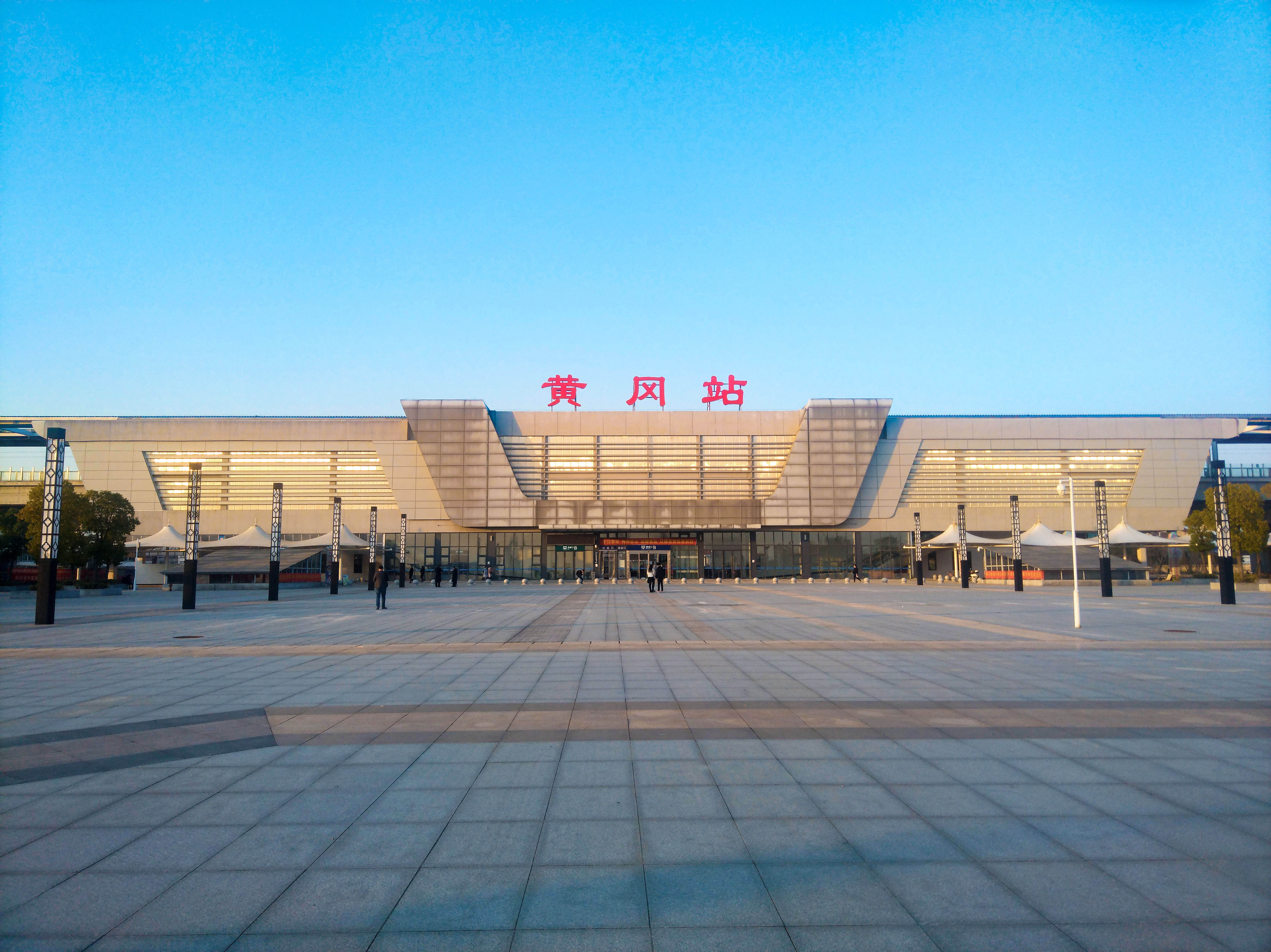 黄冈站站房